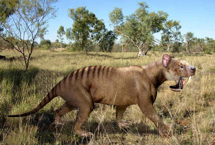 сумчатый саблезубый тигр